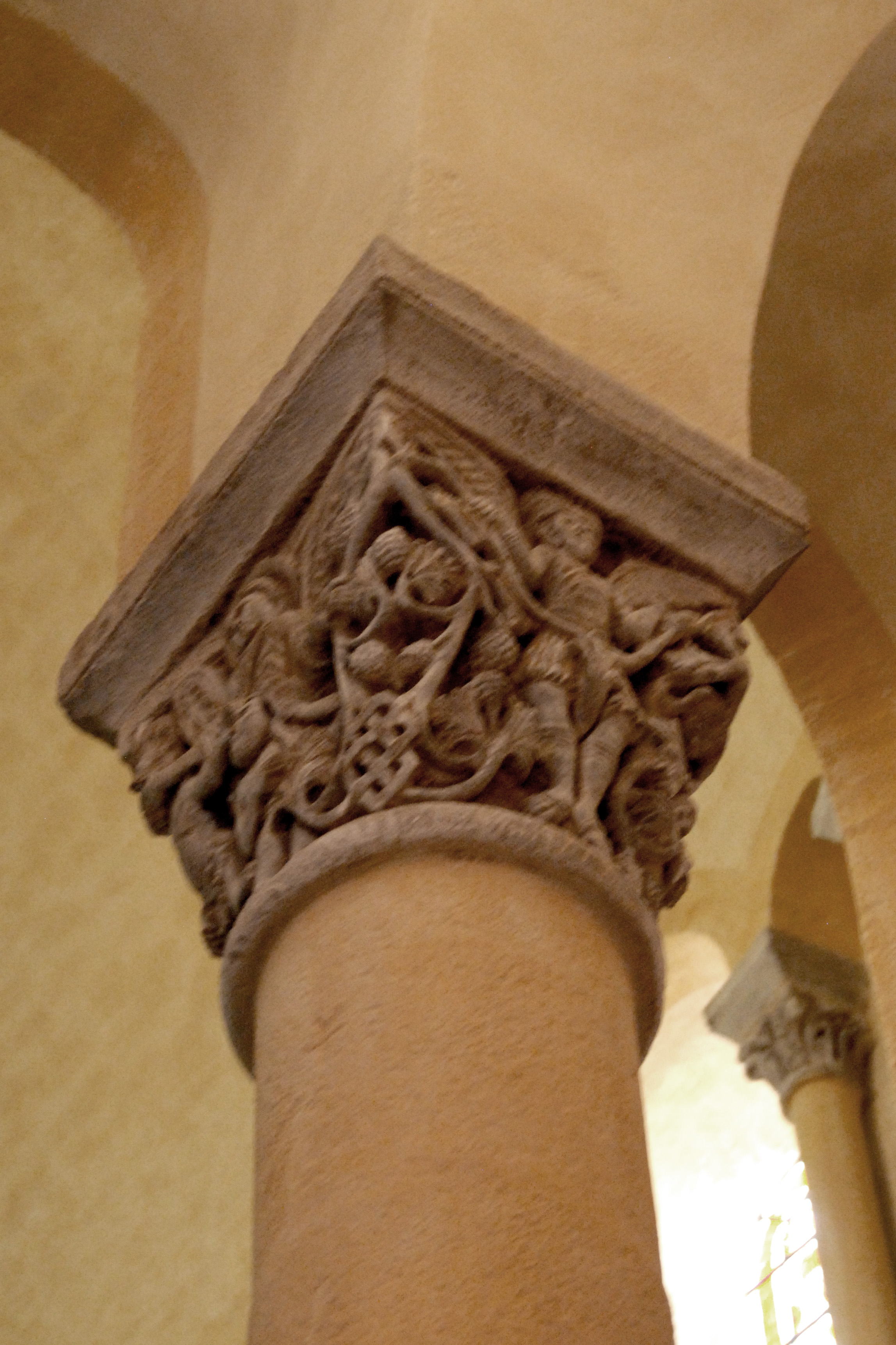 Notre-Dame du Port, Chorkapitell C, 9 + 12